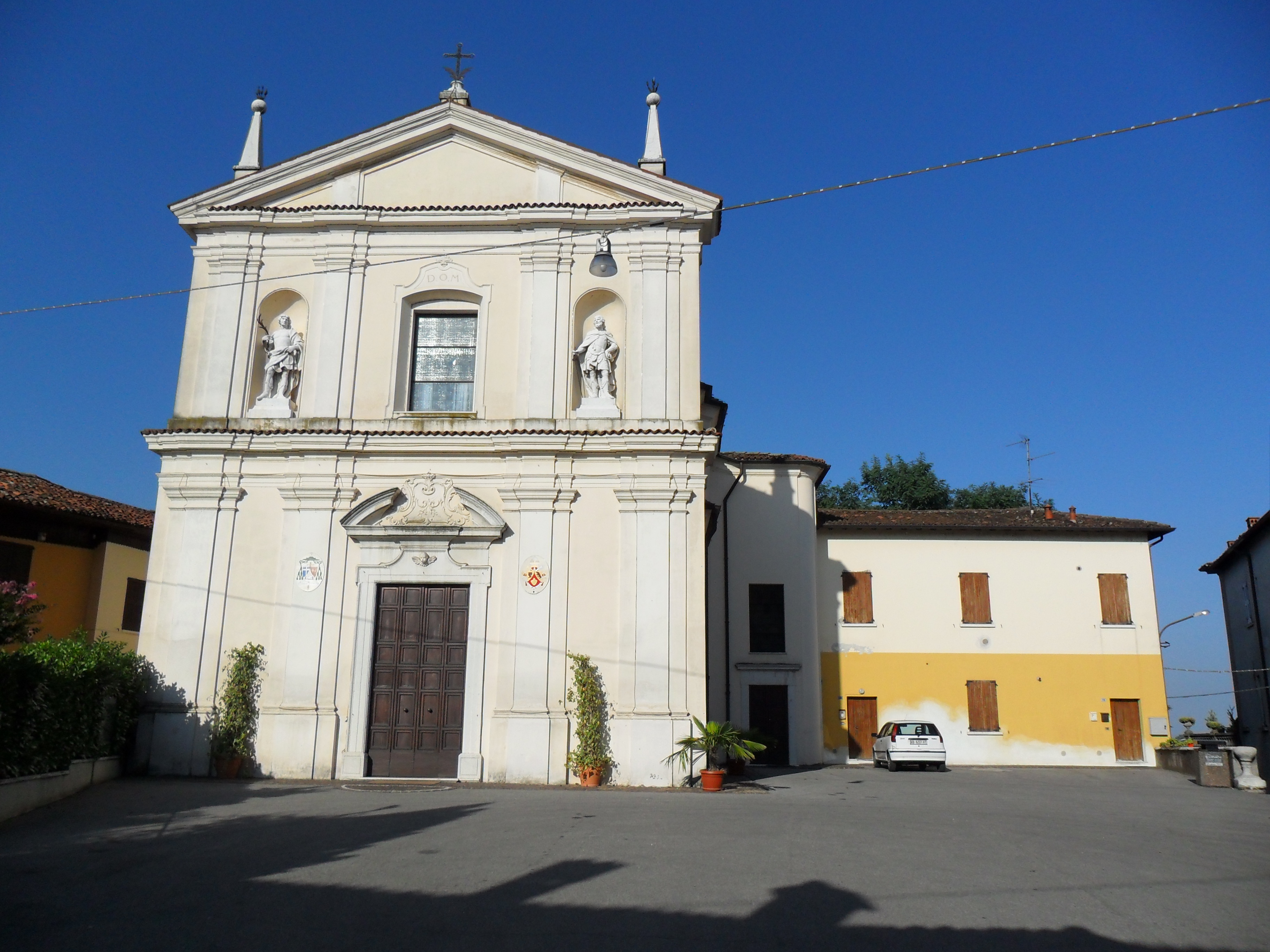 Chiesa dei Santi Gervasio e Protasio a Poncarale (BS)